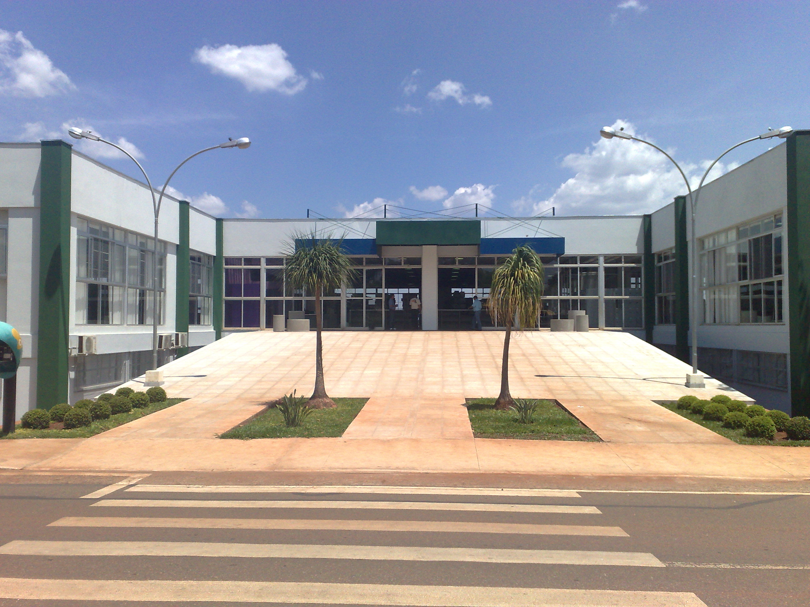 Universidade Federal de Lavras (Biblioteca Central)